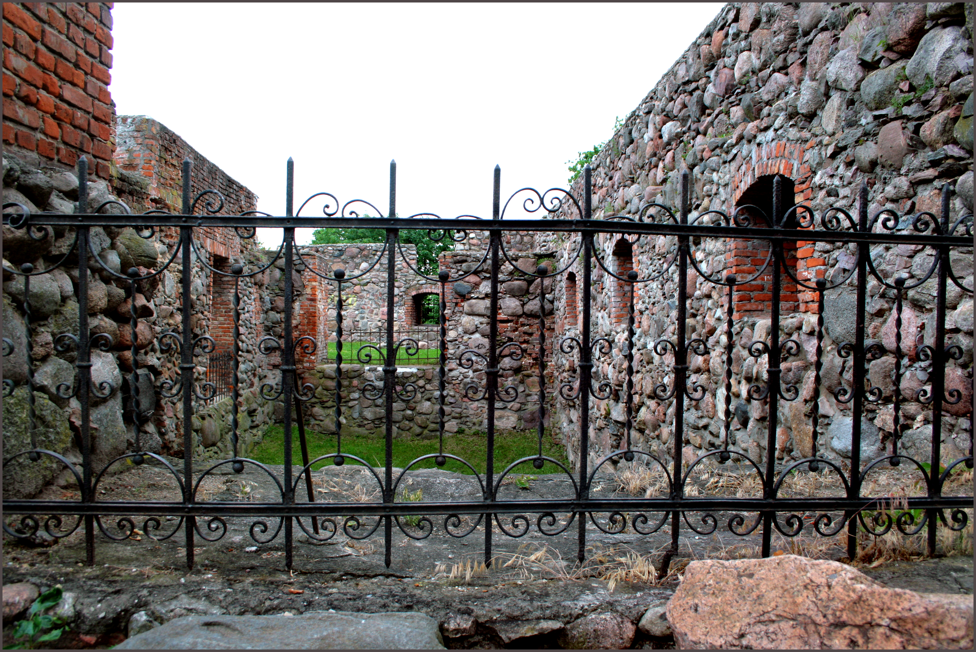 Szczytno castle ruins